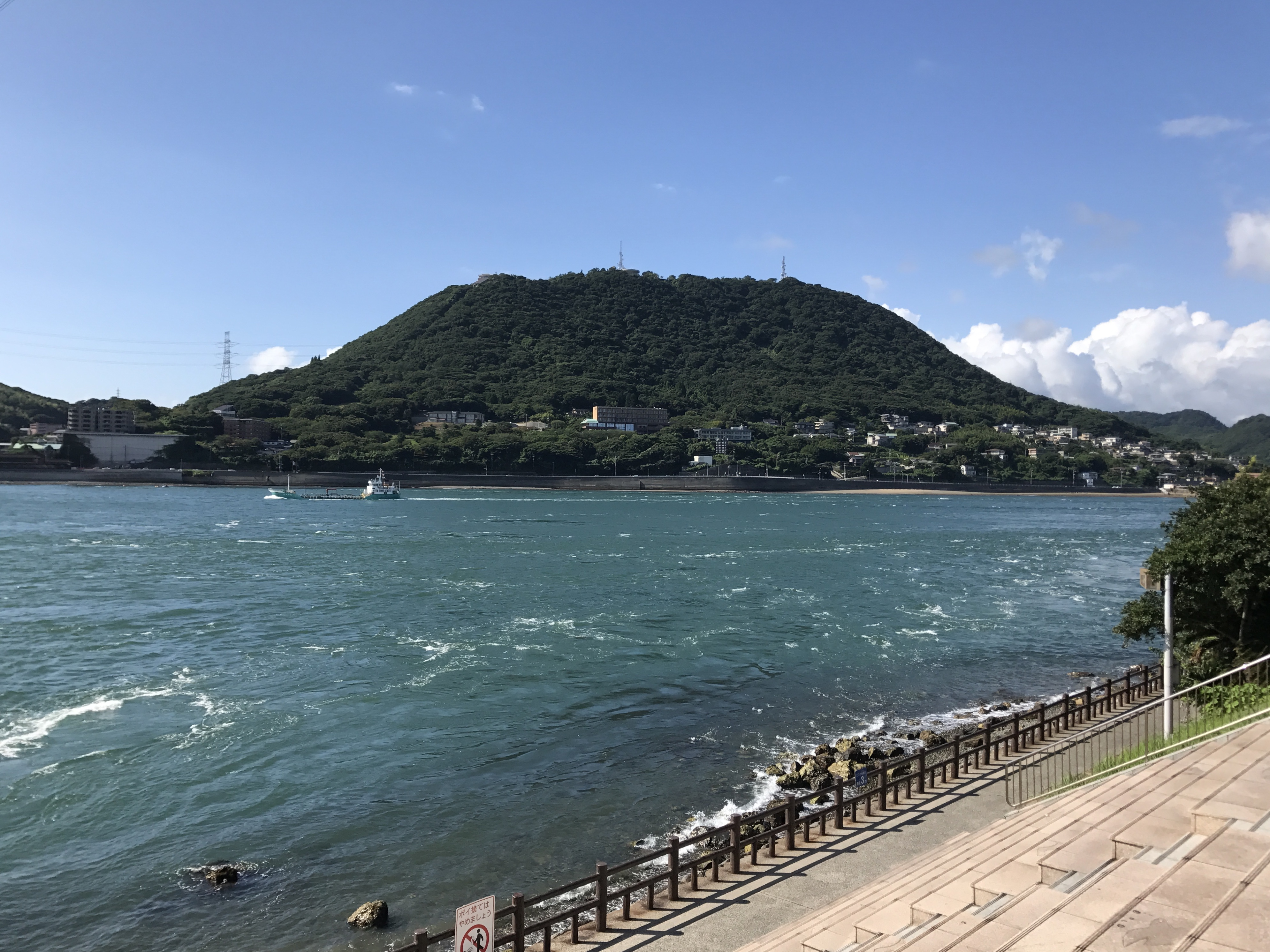 関門トンネル人道入口前より望む関門海峡と火の山